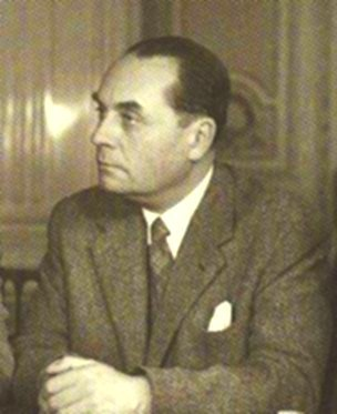 Ranuccio Bianchi Bandinelli nel 1949